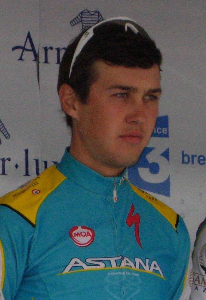 Tour de Bretagne 2013 - Présentation des équipes au départ de la deuxième étape à Ploemel - Équipe Astana Continental Depicted person: Daniil Fominykh